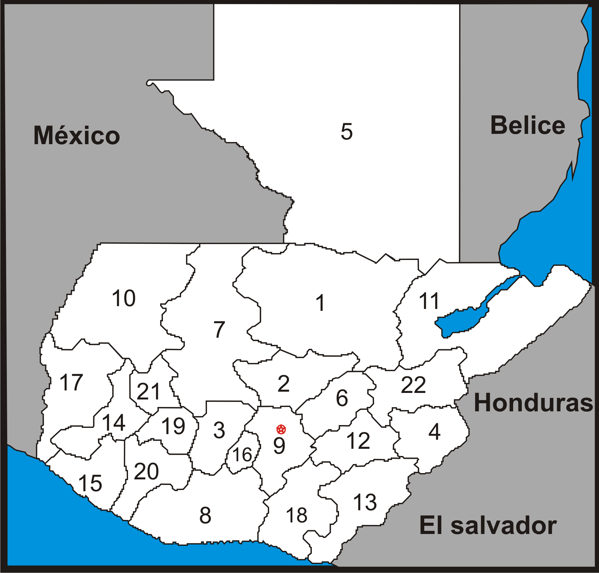 Mapa vectorizado de los estados de Guatemala.